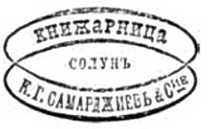 Лого на печатницата на Коне Самарджиев.